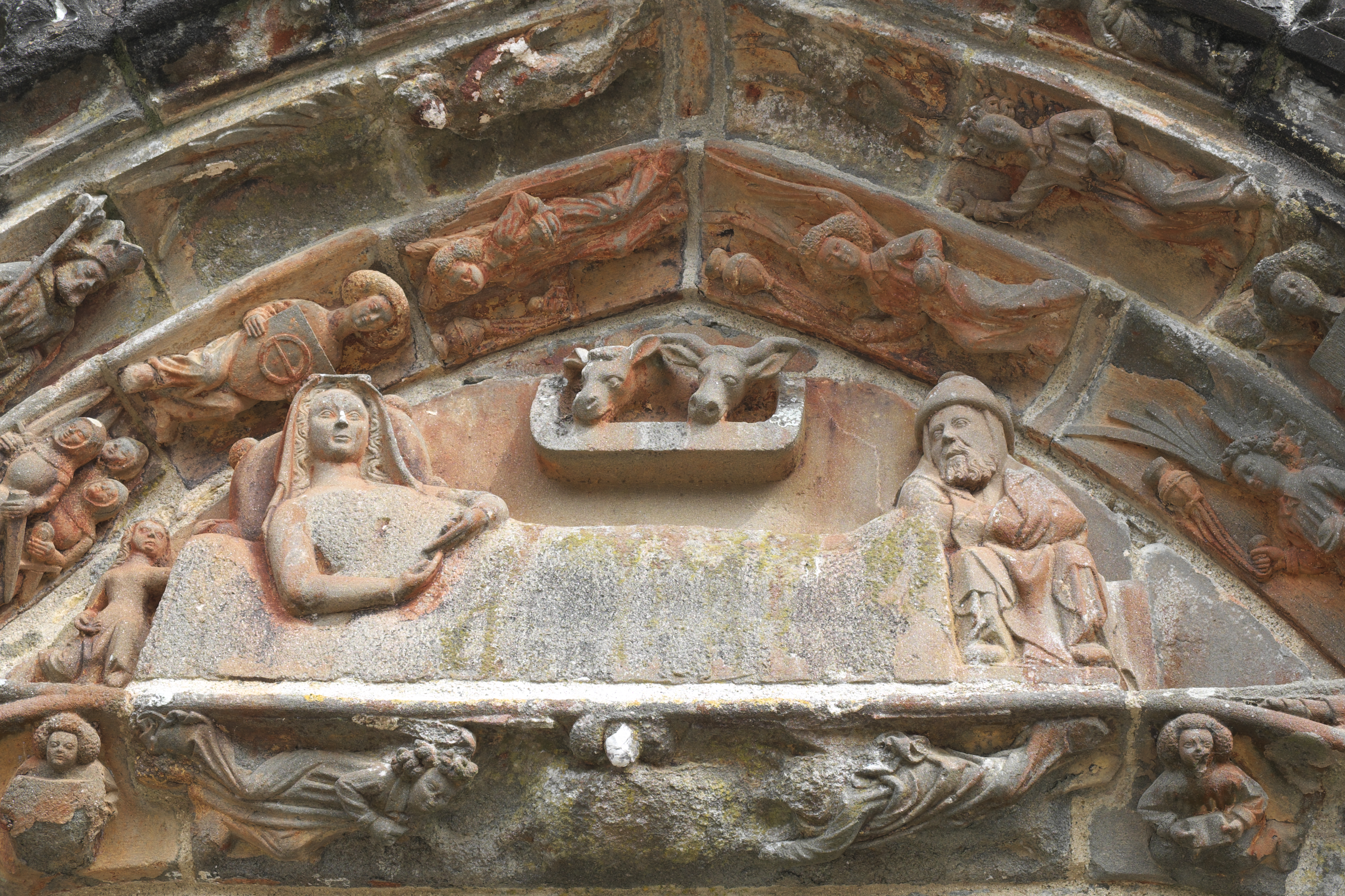 Katholische Pfarrkirche Saint-Salomon in La Martyre im Département Finistère (Region Bretagne/Frankreich), Vorhalle an der Südseite, Tympanon; Darstellung: Geburt Christi